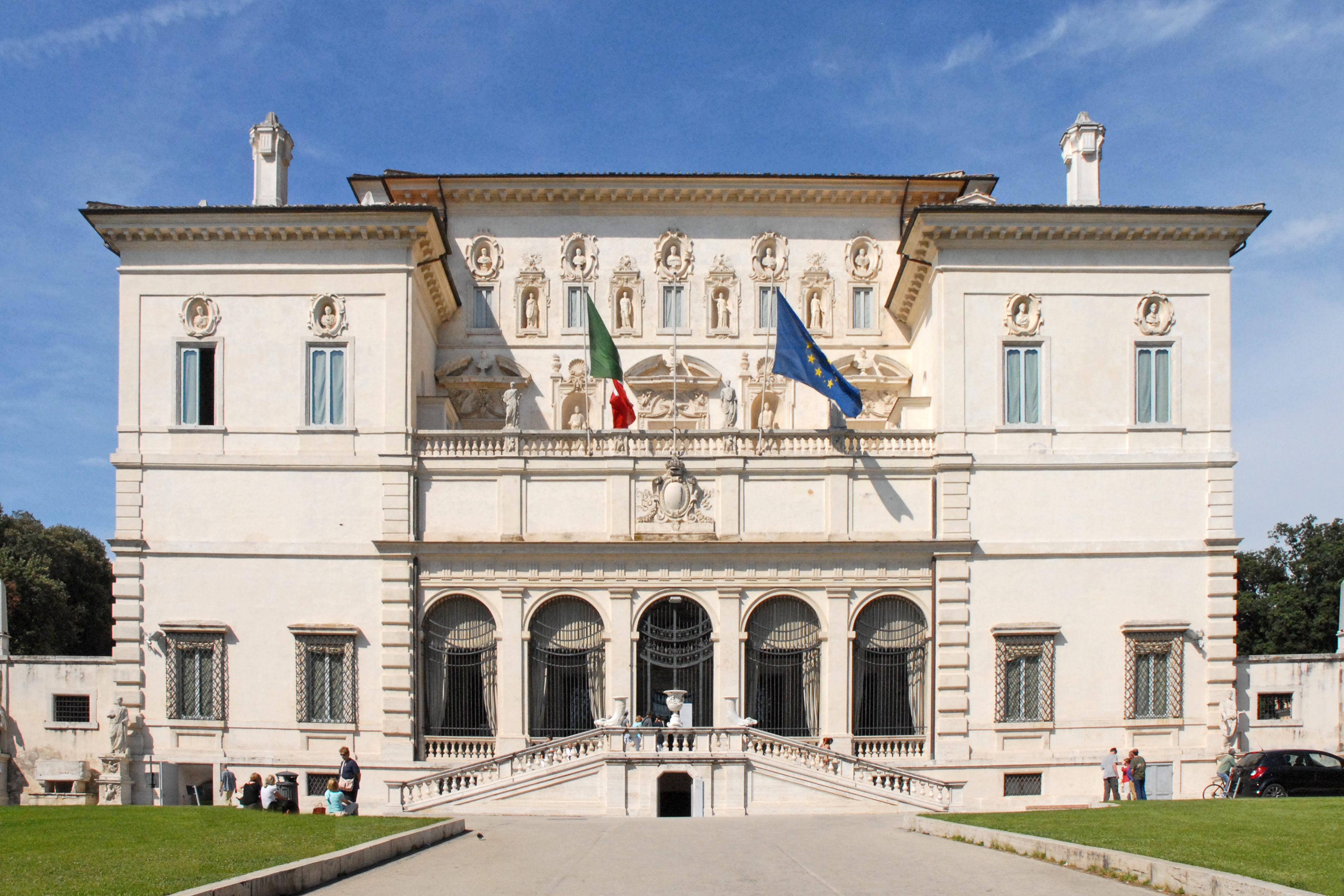 La façade principale de la villa Borghèse Scipion Caffarelli Borghèse, neveu du Pape Paul V fit élever, en 1613, la villa Pinciana (devenue la villa Borghèse) par l'architecte Flaminio Ponzio puis par l'architecte Giovanni Vasanzio. Associant les trois arts (sculpture, peinture et architecture) à la Nature, la Villa Pinciana a fondé un style nouveau pour l'époque : le baroque romain ; à ce titre elle était célèbre dans toute l'Europe. La Villa a été construite pour être une galerie d'exposition d'oeuvres d'art antique et baroque, commandées ou acquises par le Cardinal. Elle est composée de deux avant-corps à tourelles associés à un portique surmonté d'une terrasse. A l'arrière-plan, la façade est ornée de niches et d'oves abritant des statues. L'entrée s'effectue par un grand escalier à double volée. La Villa comportait également une bibliothèque, un cabinet de curiosités, un vaste jardin avec des statues, des fontaines et des plantes rares, une exploitation agricole, des pigeonniers, une volière, un jardin zoologique, une glacière, un espace pour la culture du ver à soie,.. La Villa était conçue comme un "Théâtre de l'Univers" ce que souhaitait le Cardinal. Site officiel de la galerie Borghèse